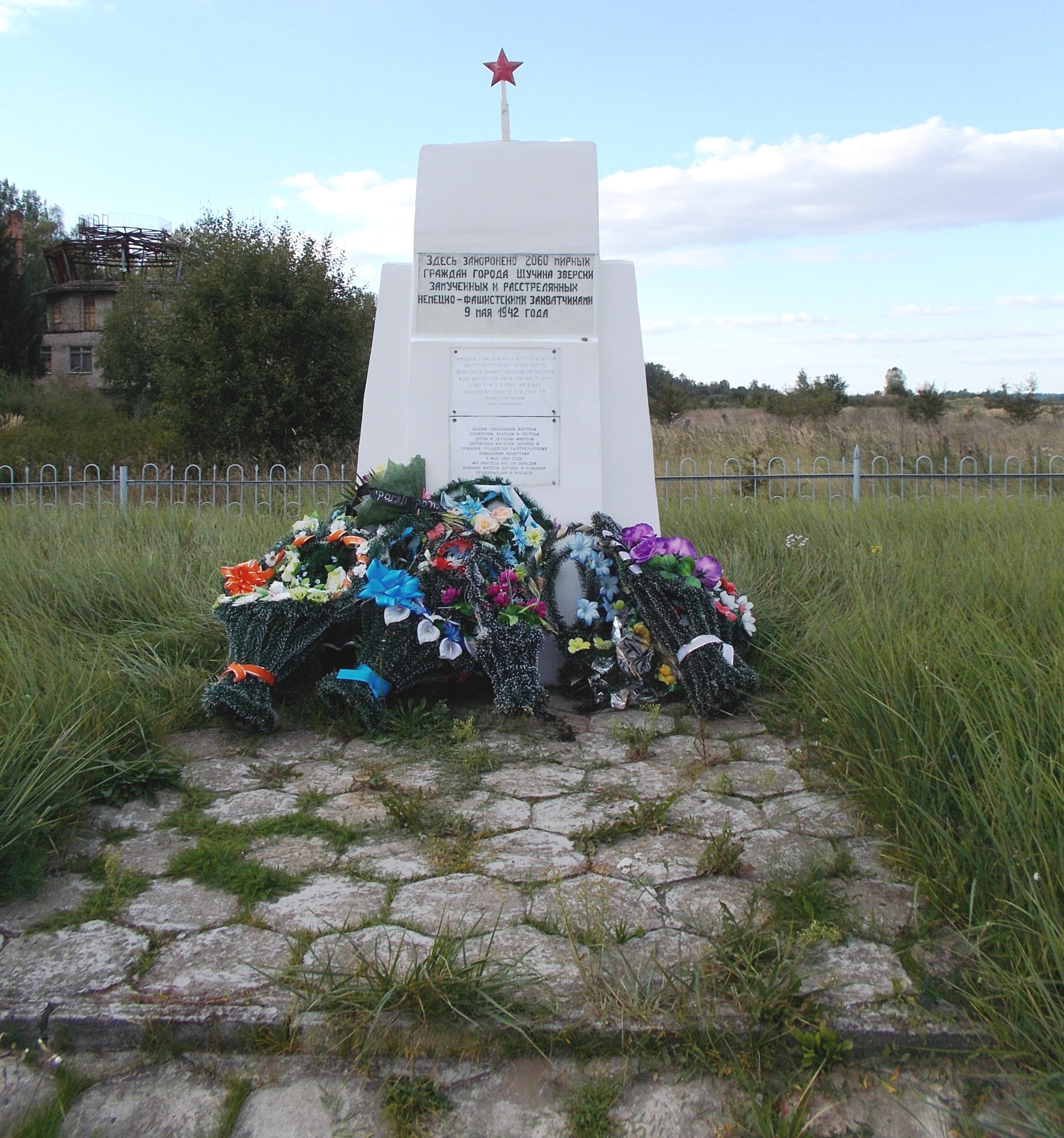 Памятник евреям Рожанки и Щучина, убитым нацистами и их пособниками 9 мая 1942 года. Находится возле Щучина.